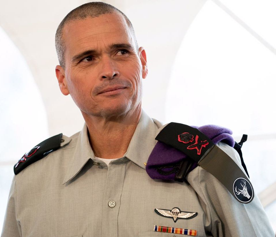 אלוף יואל סטריק.